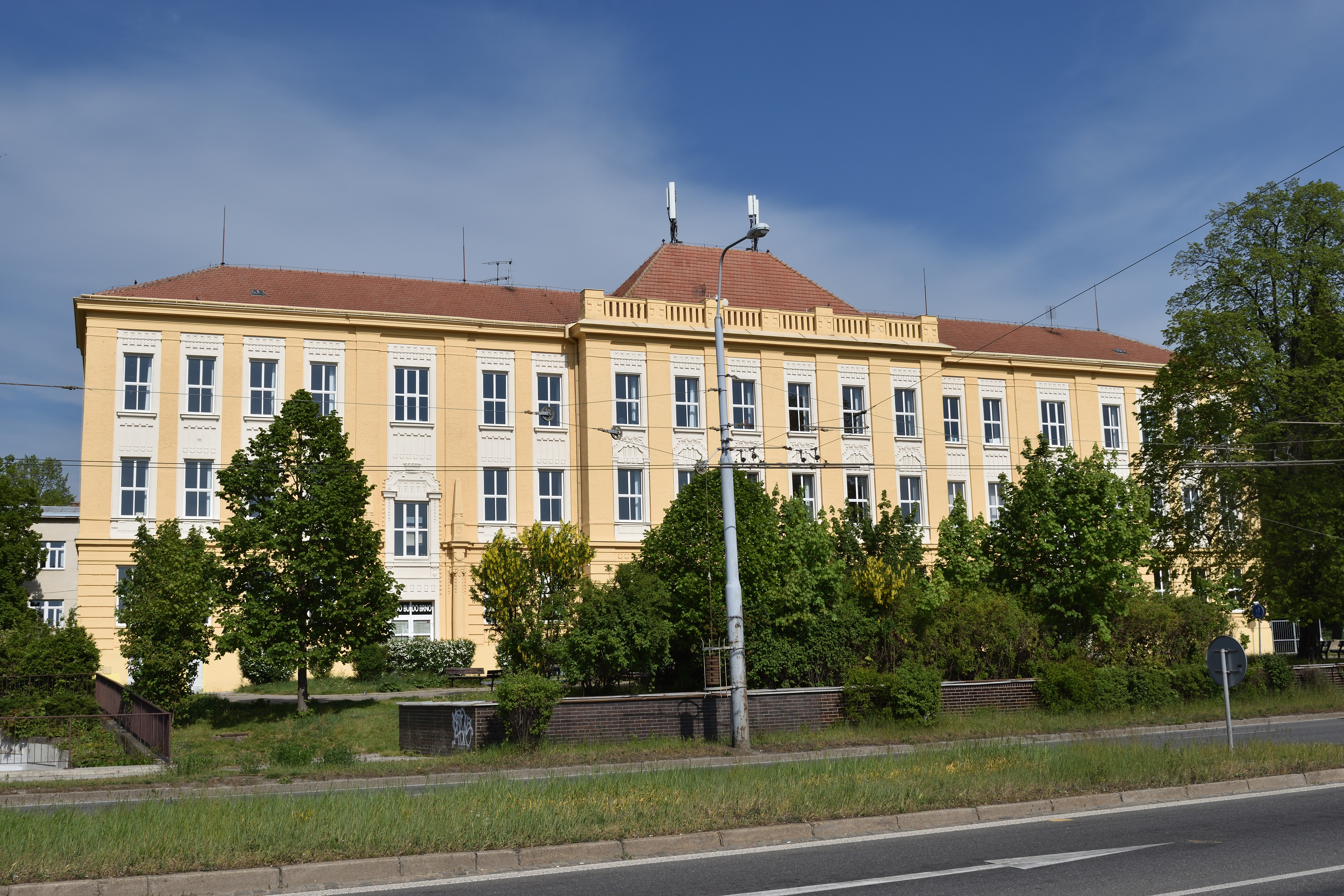 Brno-Židenice - Základní škola Gajdošova